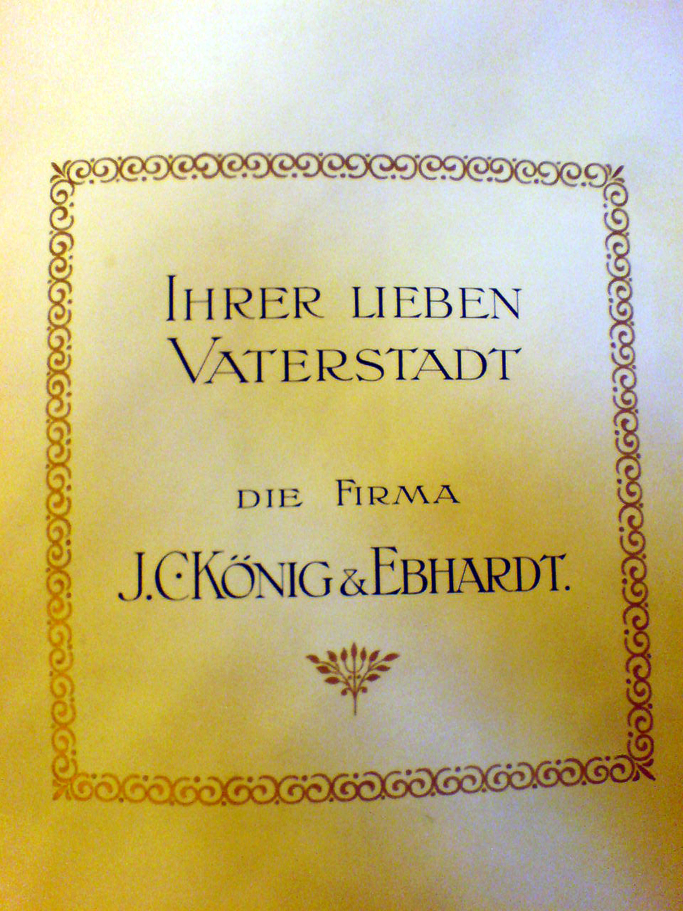 Goldenes Buch (Hannover): Widmung der Firma J. C. König & Ebhardt "ihrer lieben Vaterstadt" ...